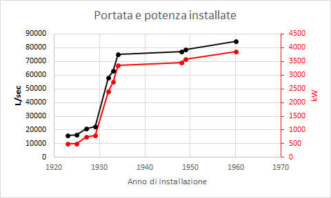 Il grafico illustra come si è evoluta negli anni la potenza totale installata e, conseguentemente, la portata in litri/secondo.